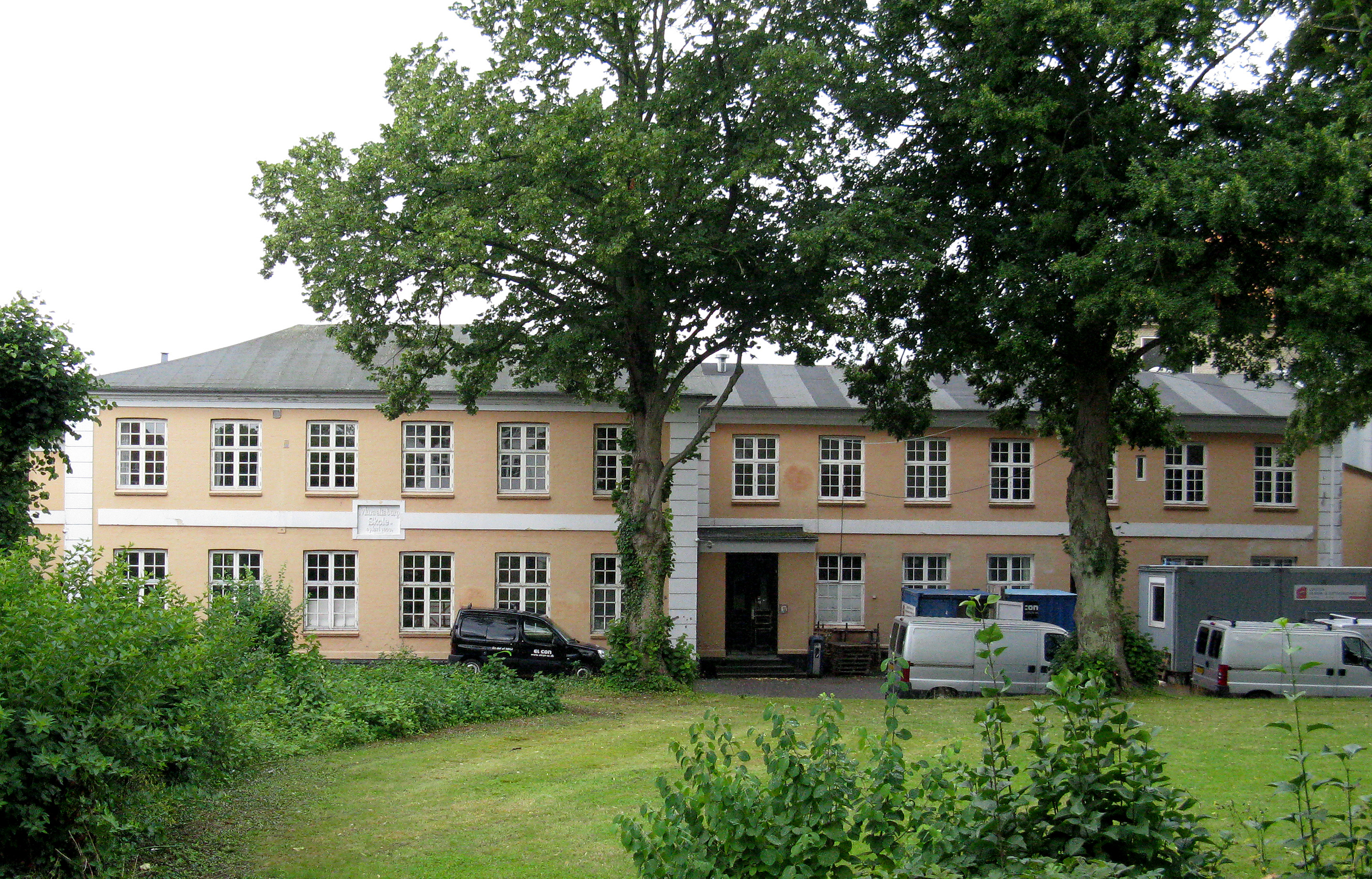 Marselisborg Gymnasium er et gymnasium i Århus oprettet i 1898